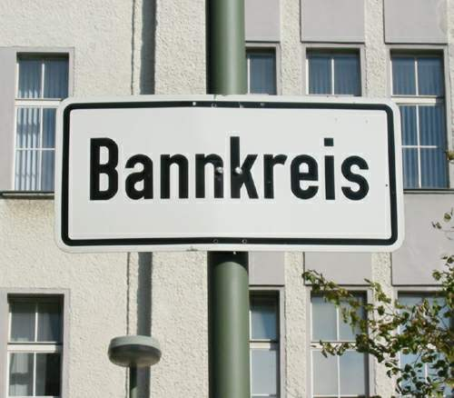 Beschilderung des Bannkreises des Abgeordnetenhauses von Berlin